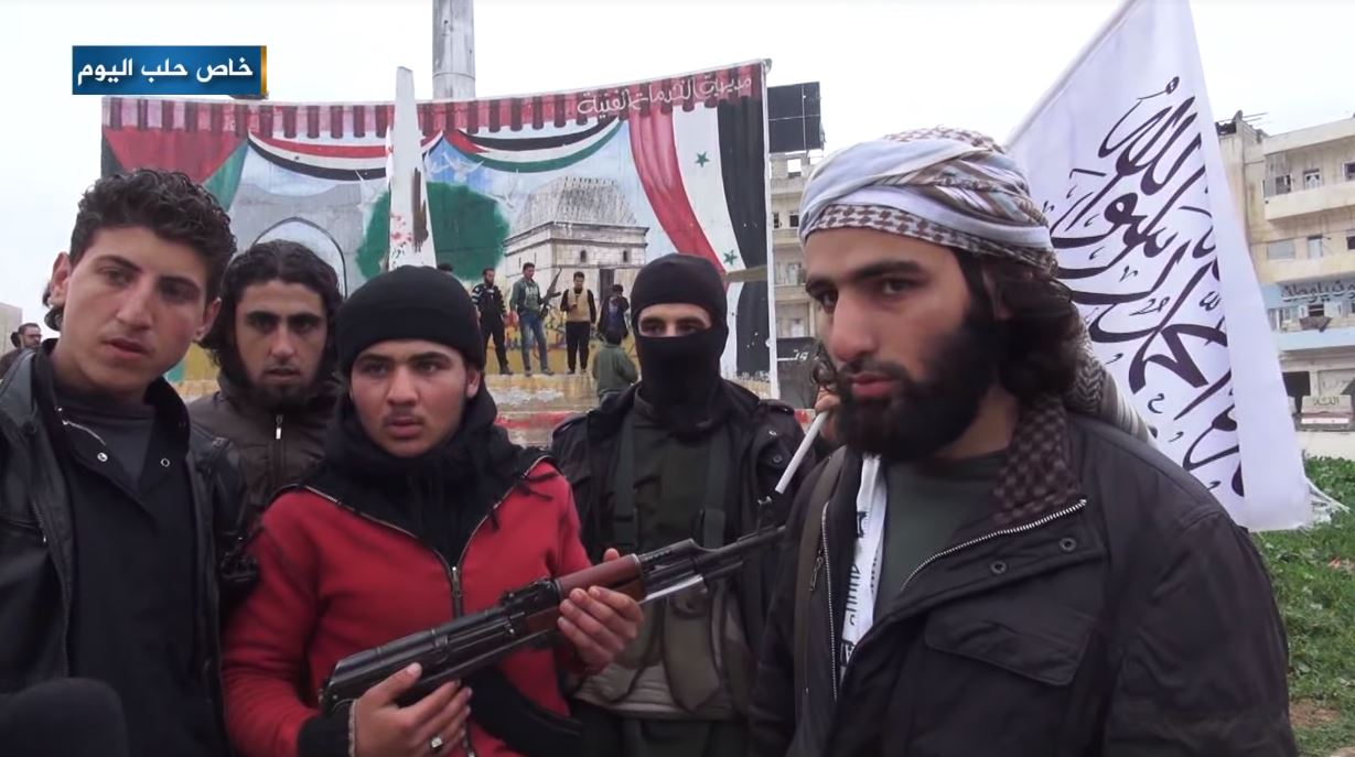 Rebelles syriens de Faylaq al-Cham, le 30 mars 2015.